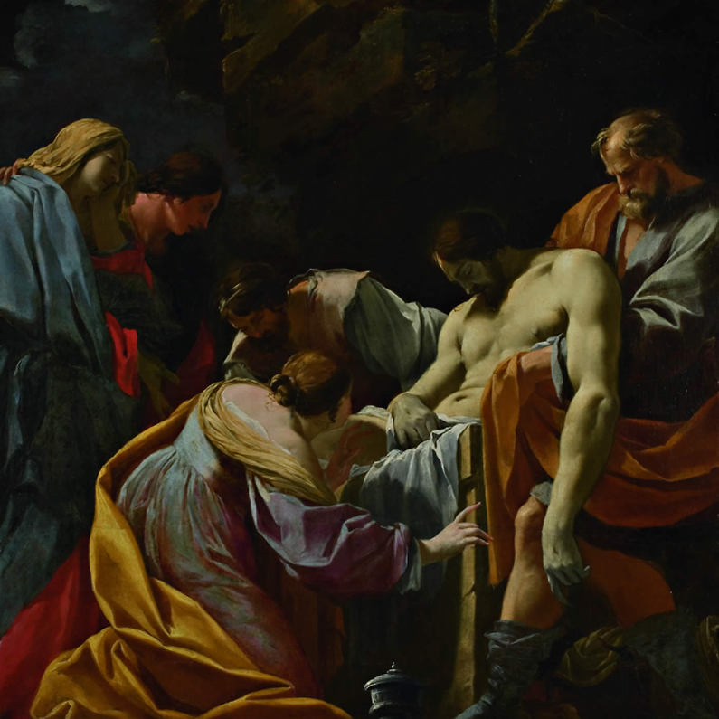 Simon Vouet, La mise au tombeau, vers 1636-1638, huile sur toile, 149,8 x 151,4 cm, Le Havre, musée André Malraux.